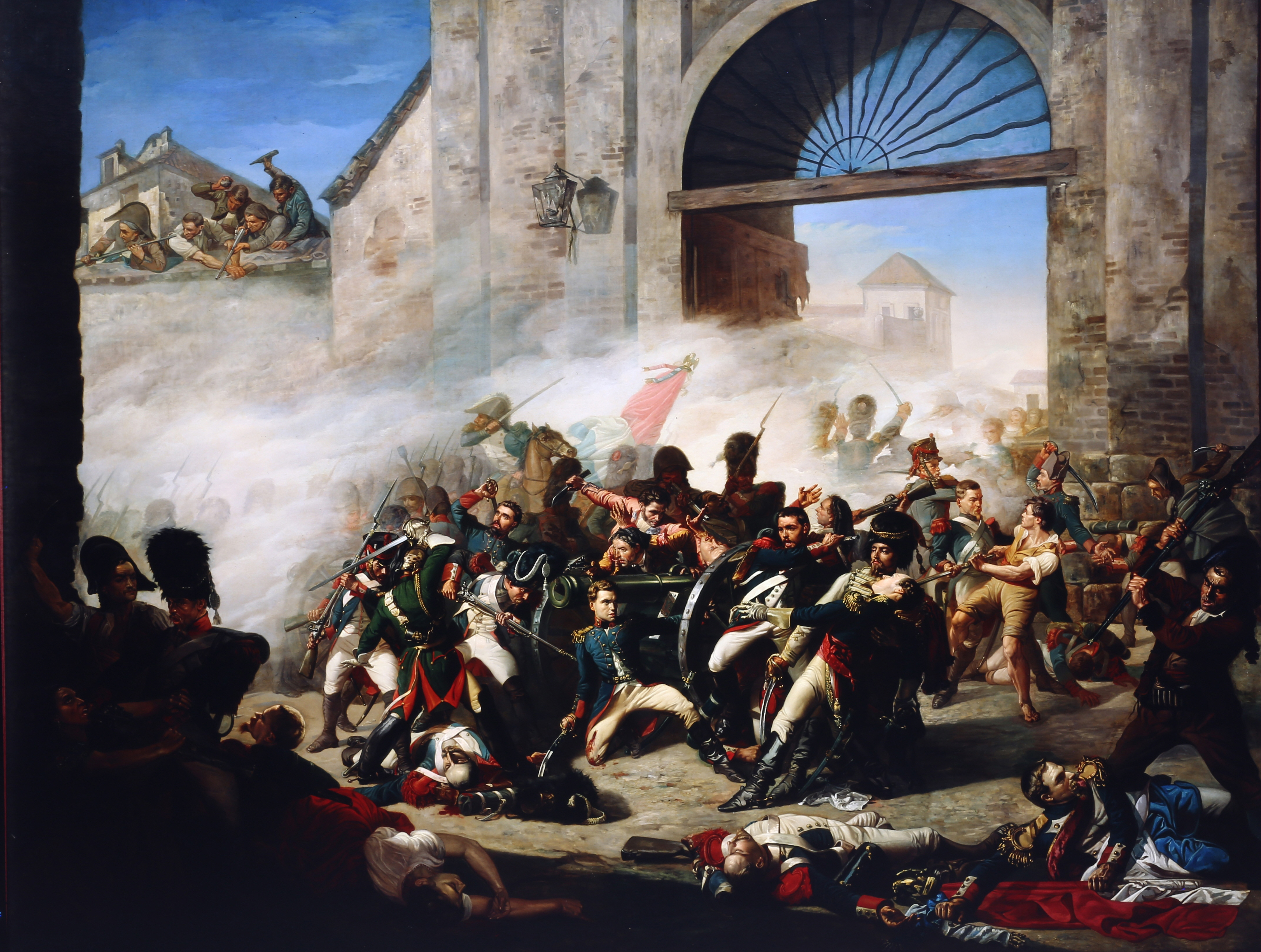 Cuadro sobre la muerte de Daoiz y defensa del Parque de Monteleón.